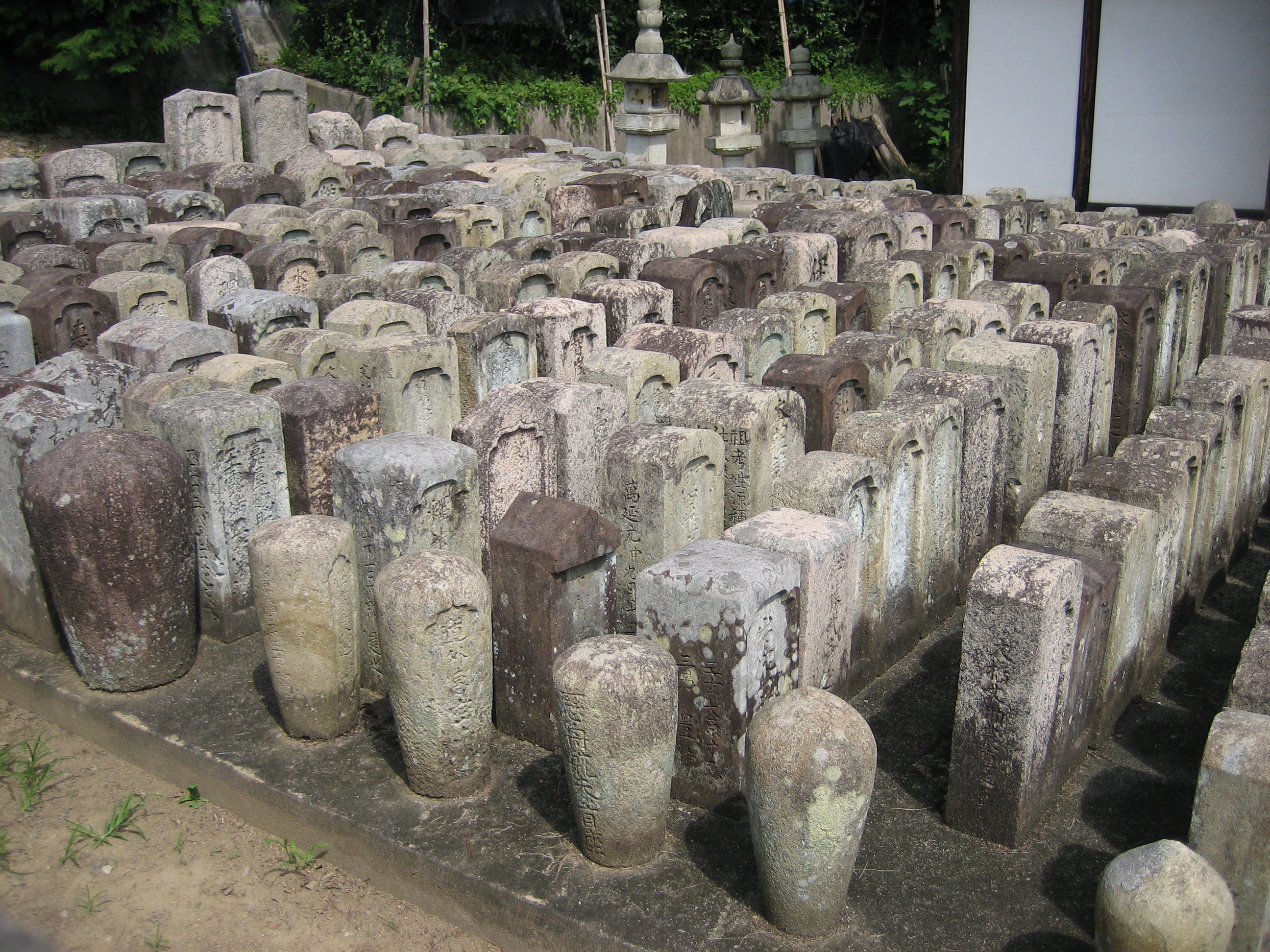 景福寺山麓の寺、景福寺に集められた江戸時代末期(万延年間など)頃の墓石群。